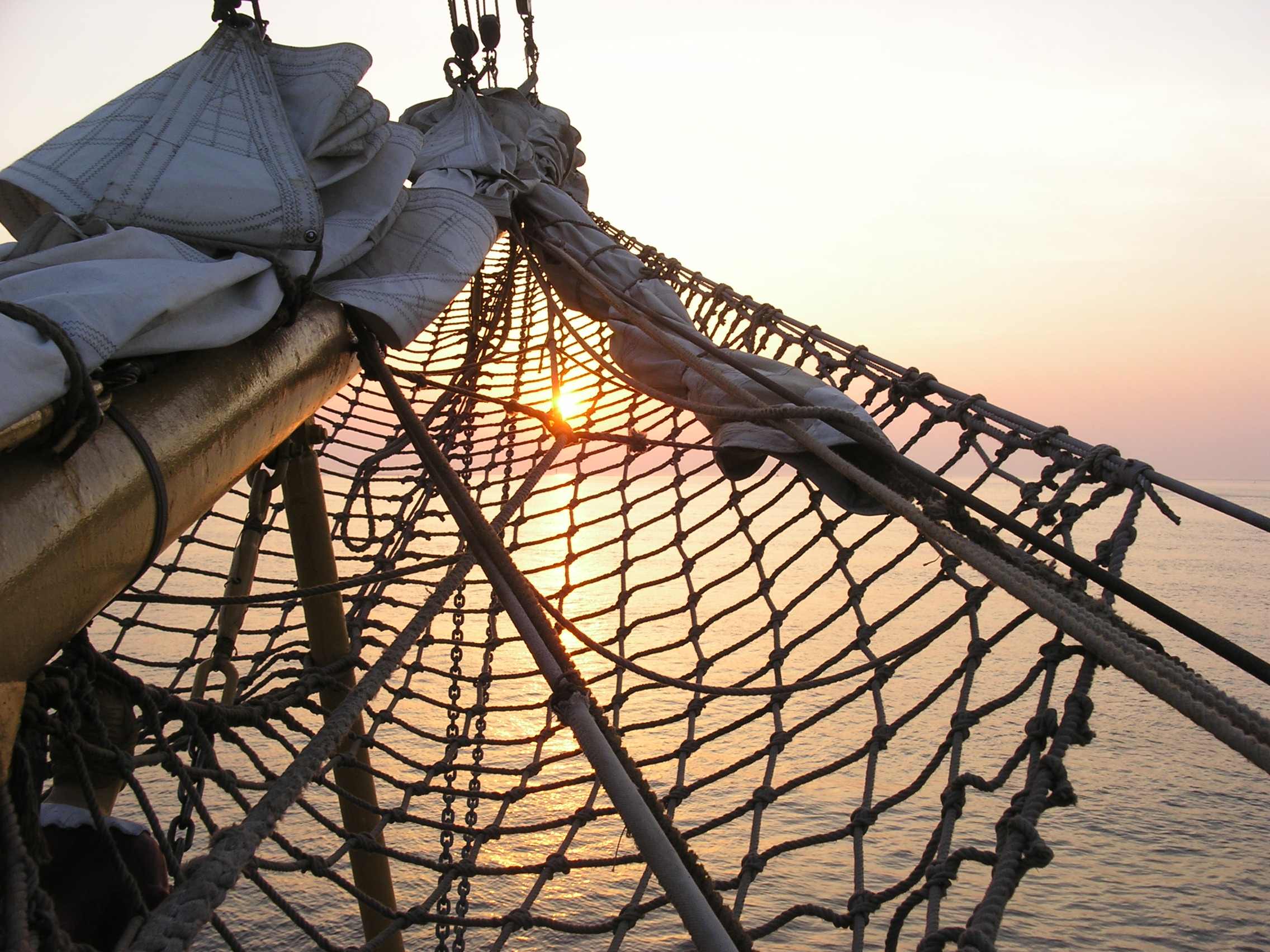 Abenddämmerung auf Grossherzogin Elisabeth in der Wesermündung